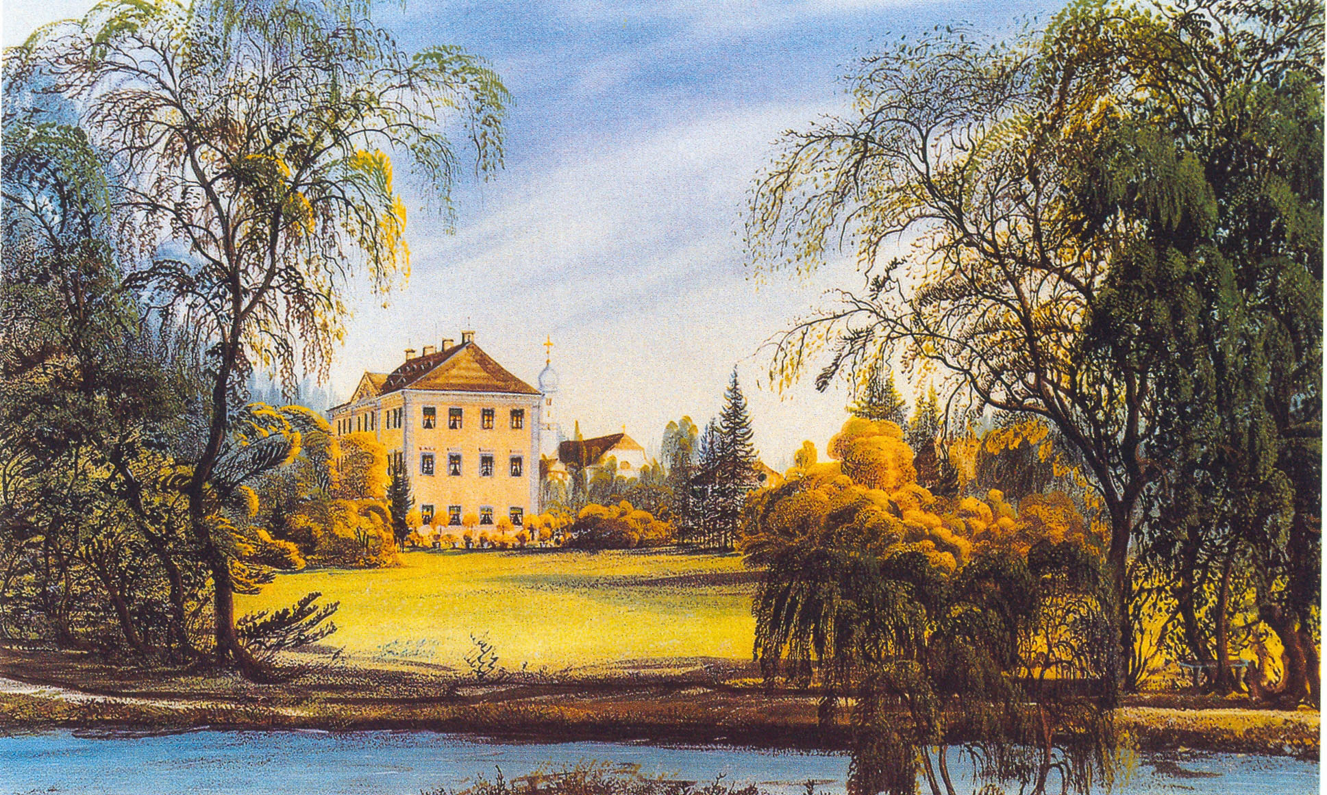 Schloß Rißtissen der Schenken von Stauffenberg Gouache